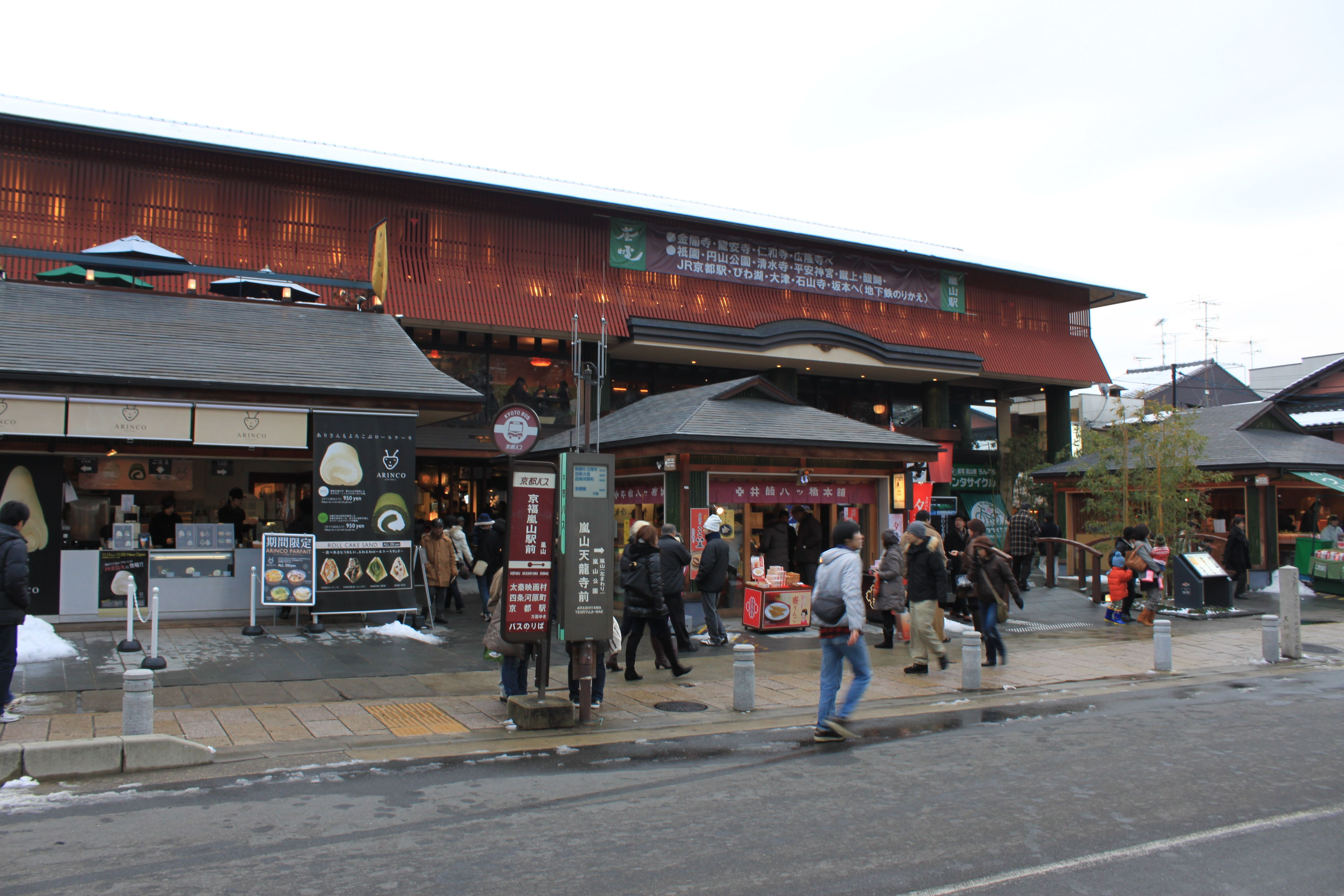 嵐電嵐山駅